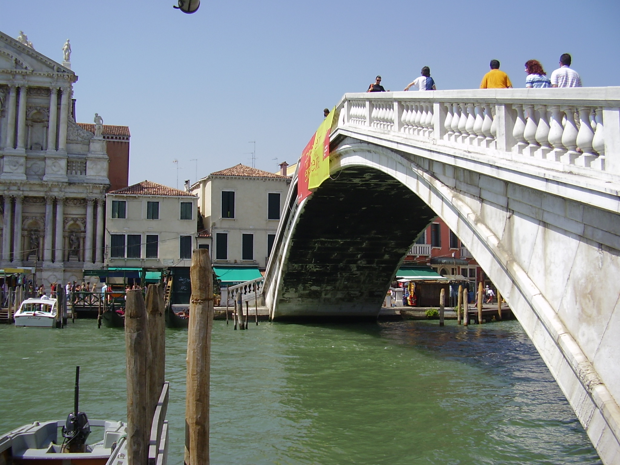 Puente sobre el Canal Grande en Venezia / Bridge on the Grand Canal - Venice